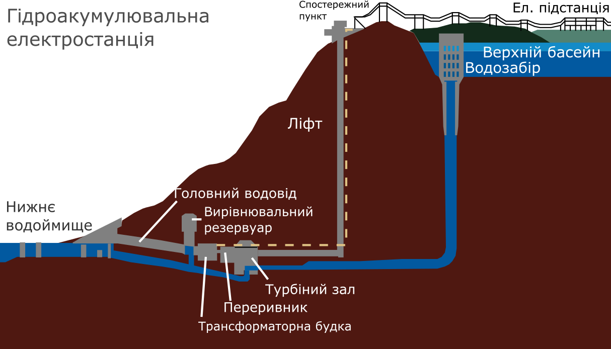 Схема гідроакумулювальної станції